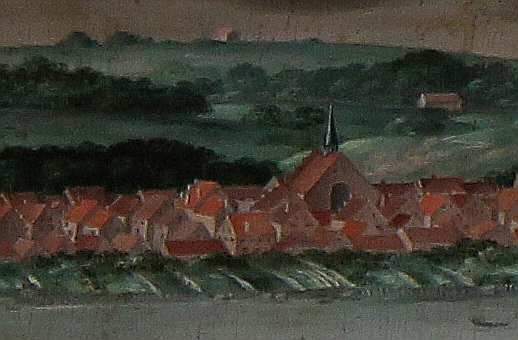 Die Heiliggeistkirche auf dem Beyerschen Epitaph in St. Marien (Flensburg) von 1591